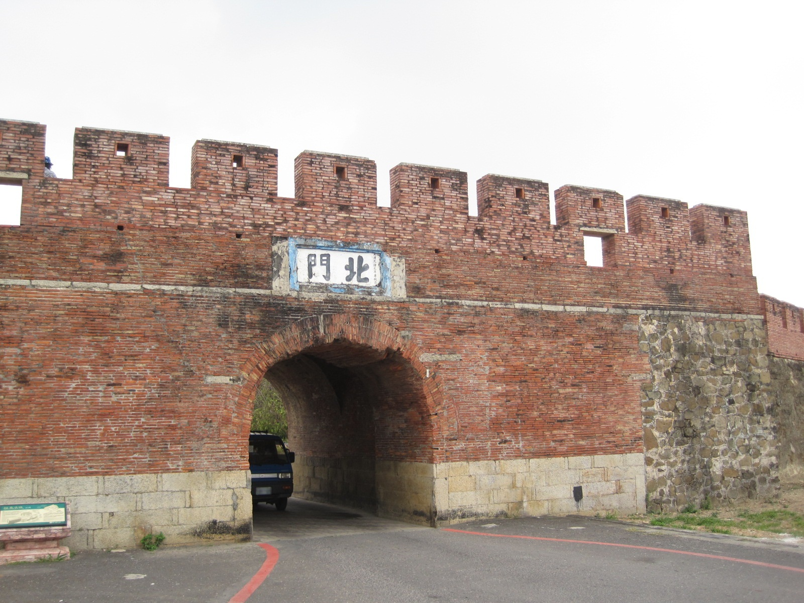 恆春縣城北門